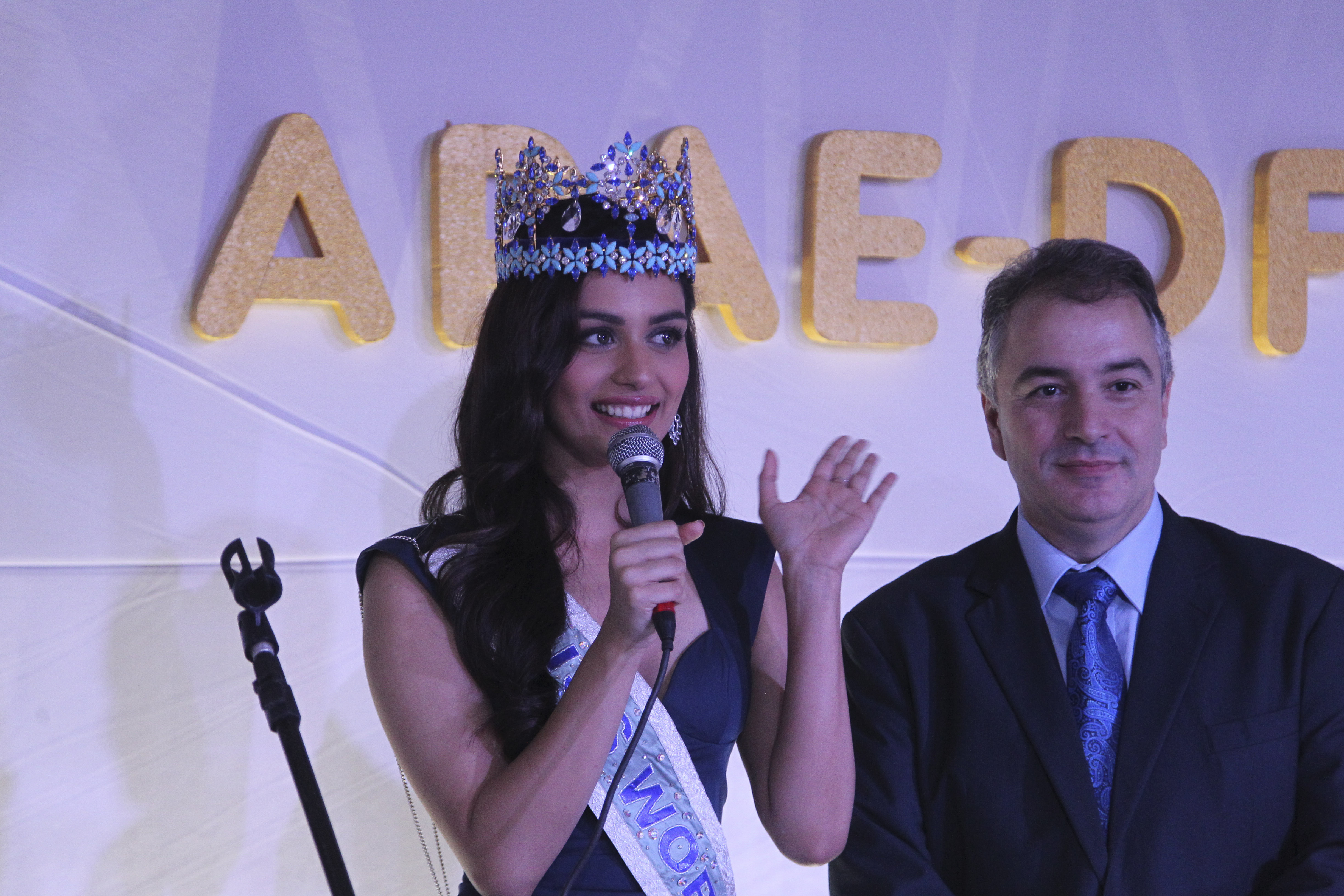 Hípica Hall, Brasília, DF, Brasil 18/4/2018 Foto: Toninho Tavares/Agência Brasília. A terceira edição do Corações Vips, noite solidária da Associação de Pais e Amigos dos Excepcionais do Distrito Federal (Apae-DF), ocorreu nesta quarta-feira (18). O governador do Distrito Federal, Rodrigo Rollemberg, acompanhado da esposa, Márcia Rollemberg, prestigiou o evento. Um dos destaques da noite foi a presença da Miss Mundo, a indiana Manushi Chhillar.